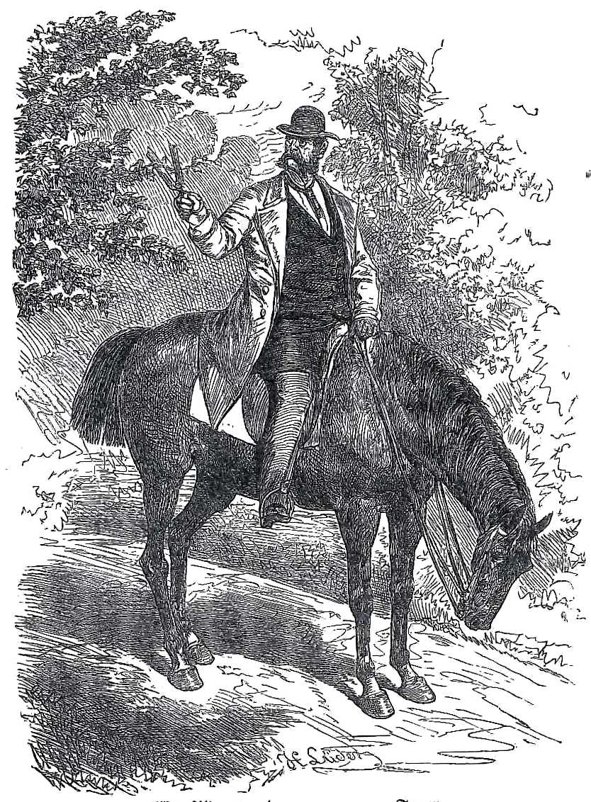 Klein-Glienicke Prinz Carl bei der Baumpflege, Heinrich Lüders, 1882